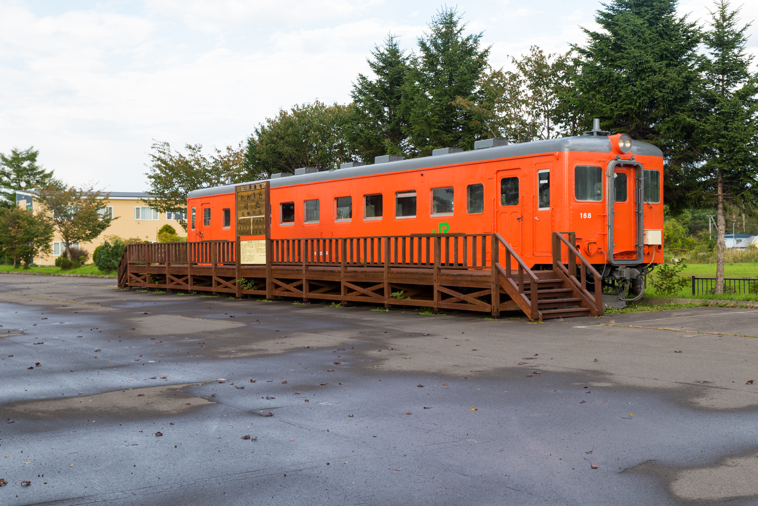 北海道旅客鉄道株式会社標津線川北駅跡地